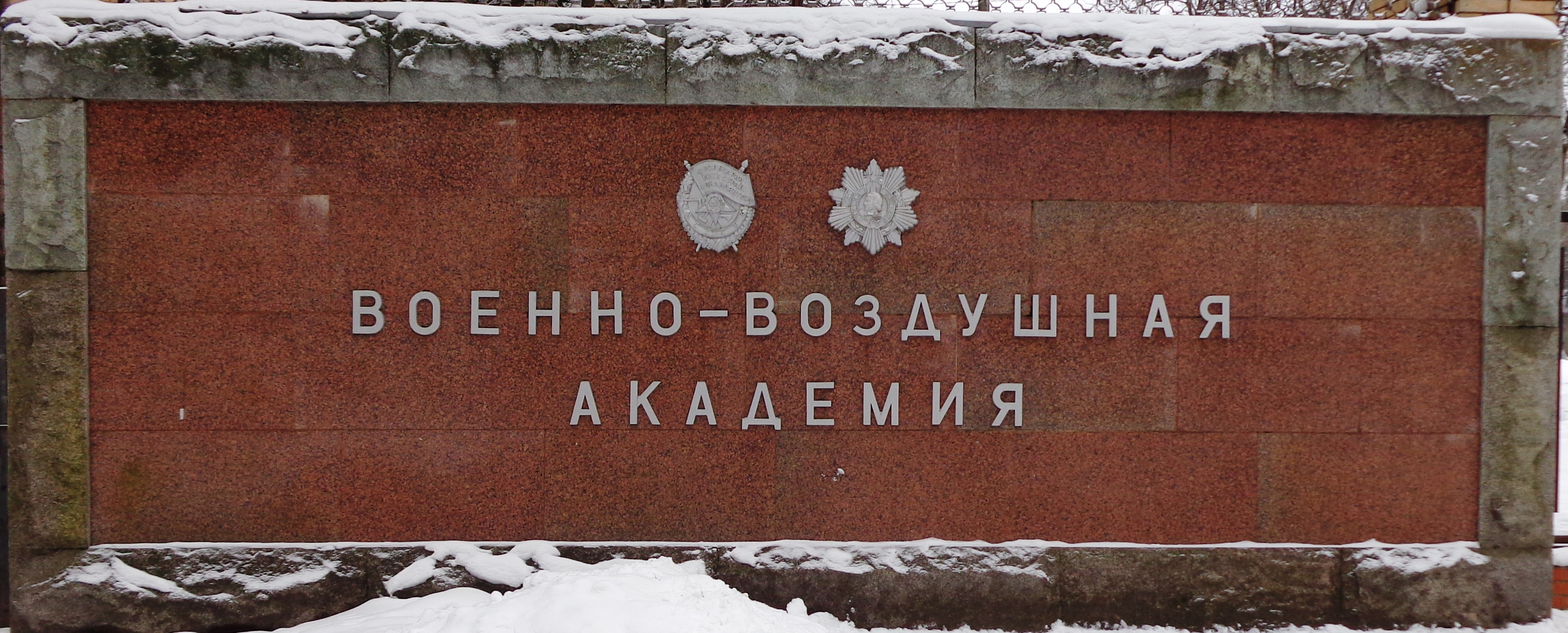 Мемориальный постамент на входе в Академию